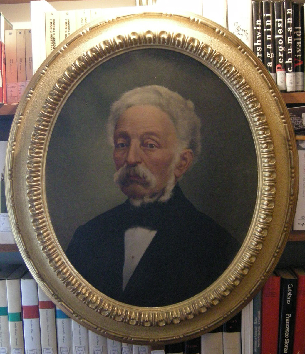 Primo piano, biblioteca, fondo zannetti, ritratto ferdinando zannetti